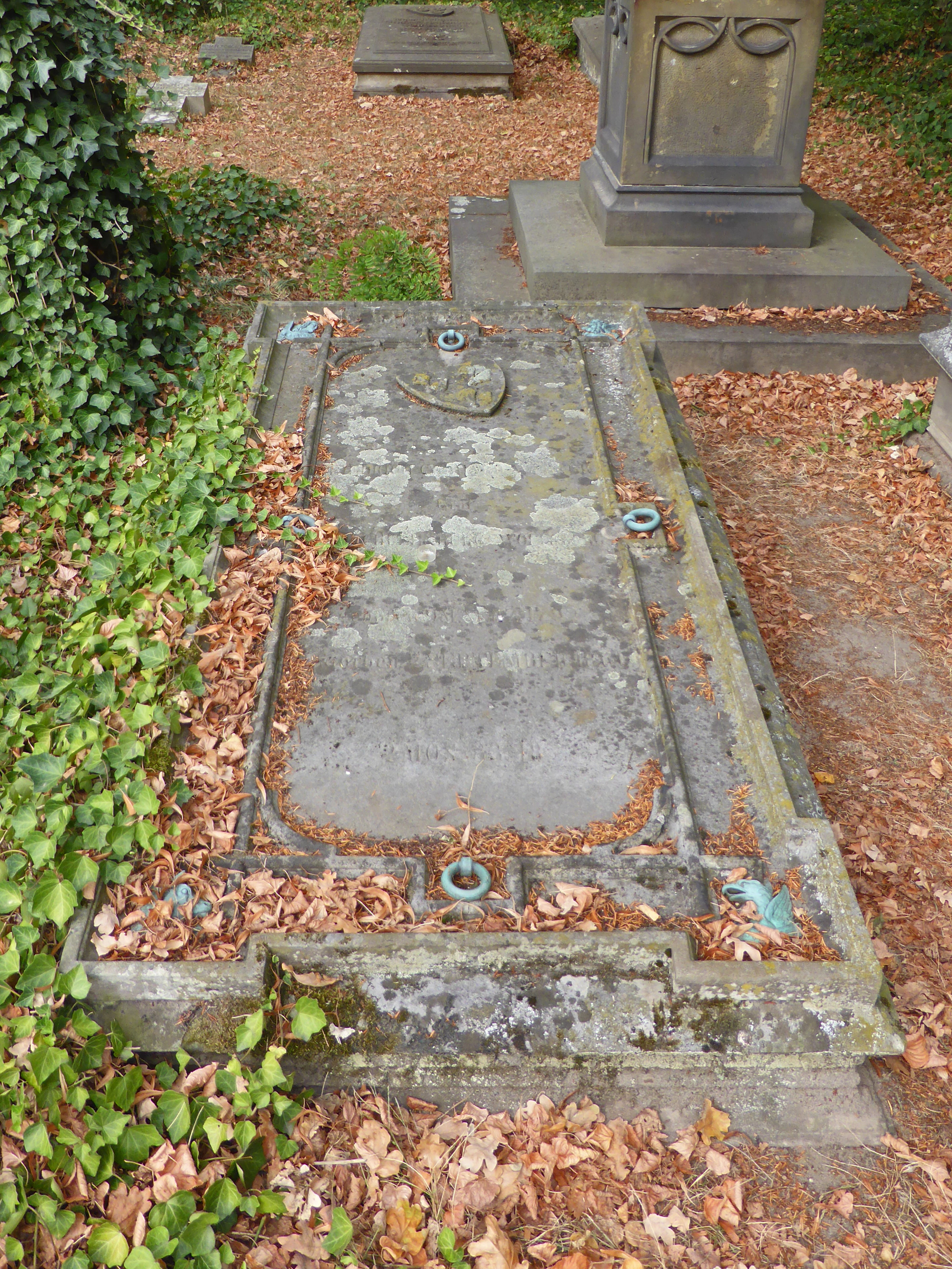 Grabstätte von Friedrich Gebhard Werner Graf von der Schulenburg-Wolfsburg, geboren 9. März 1792, gestorben 2. September 1861.